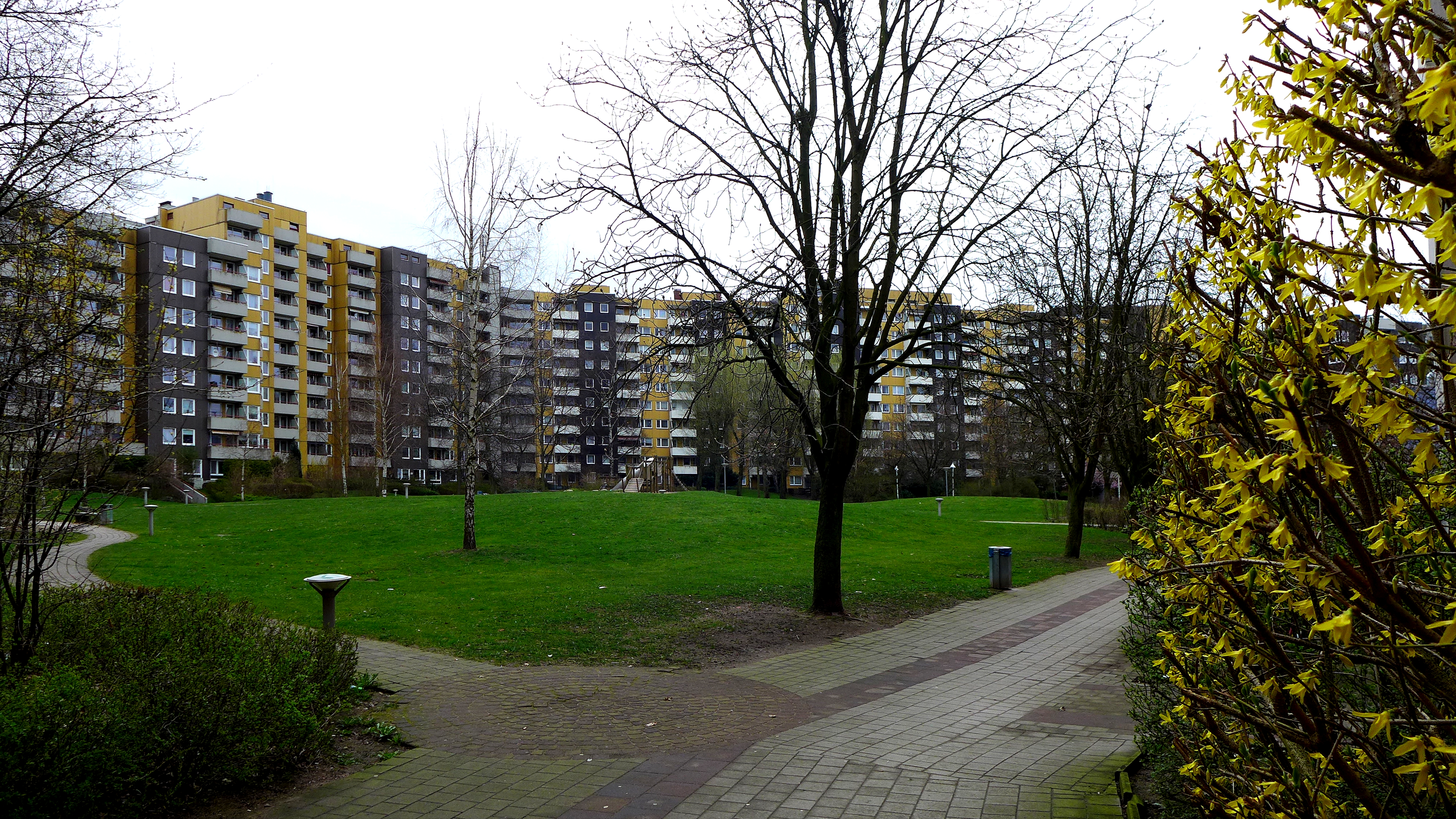 Wohnbauten an der Straße Ottensweide in Kirchdorf Süd, Hamburg_Wilhelmsburg. Aufnahmedatum 2017-03.